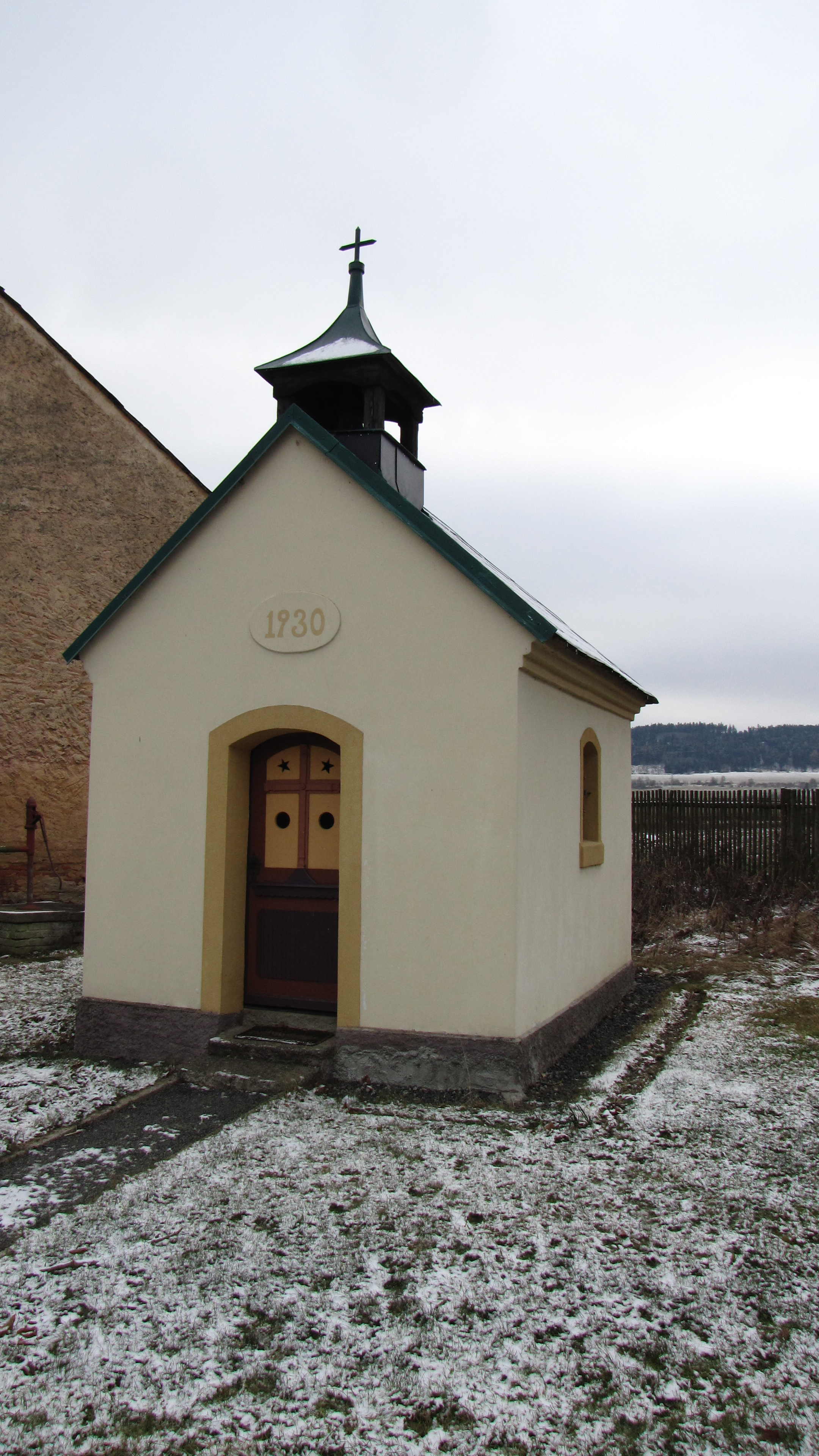 Luhov